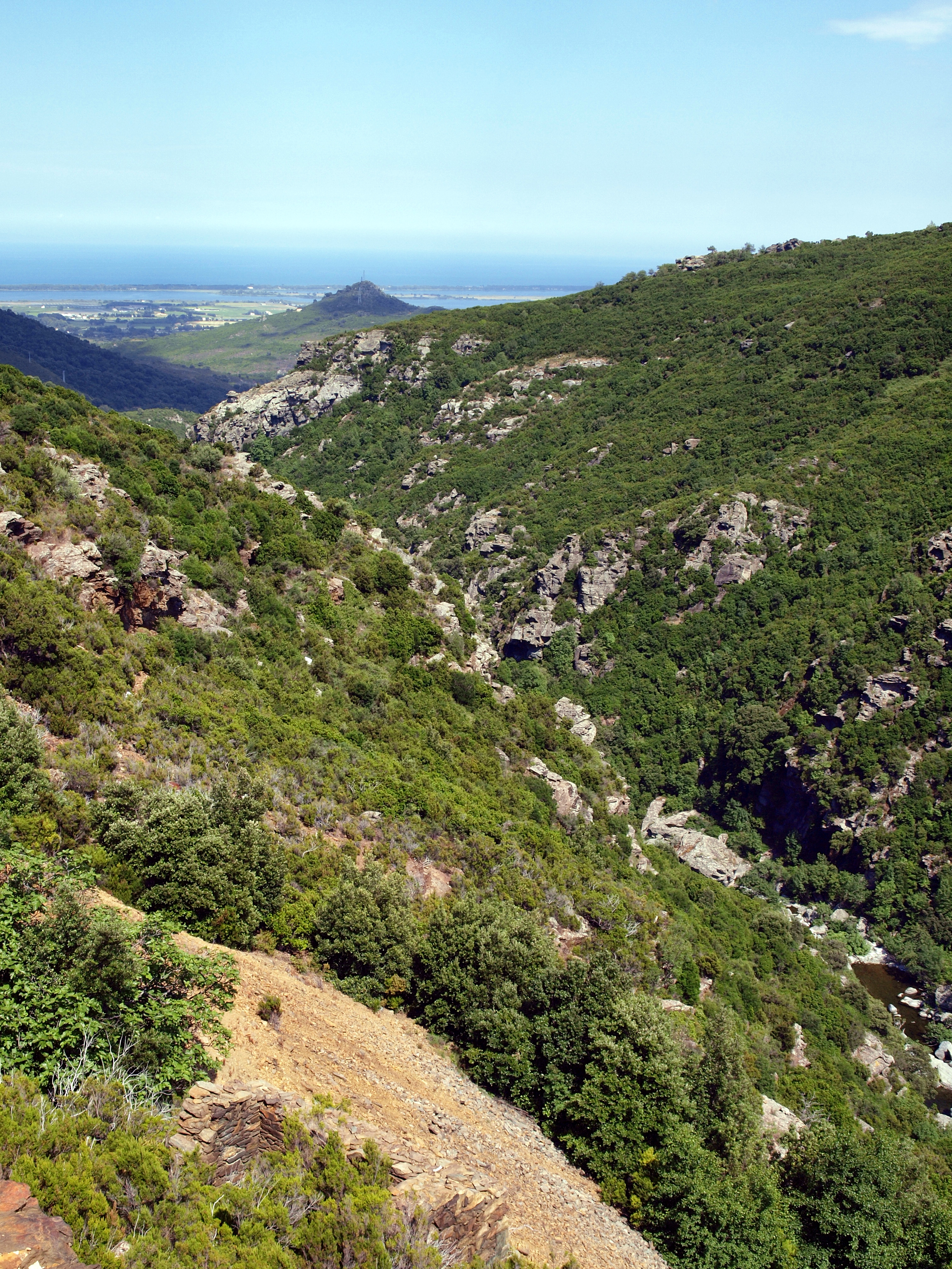 Rutali, Nebbio (Corse) - Le Bevinco en aval du défilé de Lancone, séparant Olmeta-di-Tuda à gauche, de Rutali à droite. Au bout de celui-ci, le Monte Grosso (191 m), colline dominant la plaine de la Marana et l'étang de Biguglia.